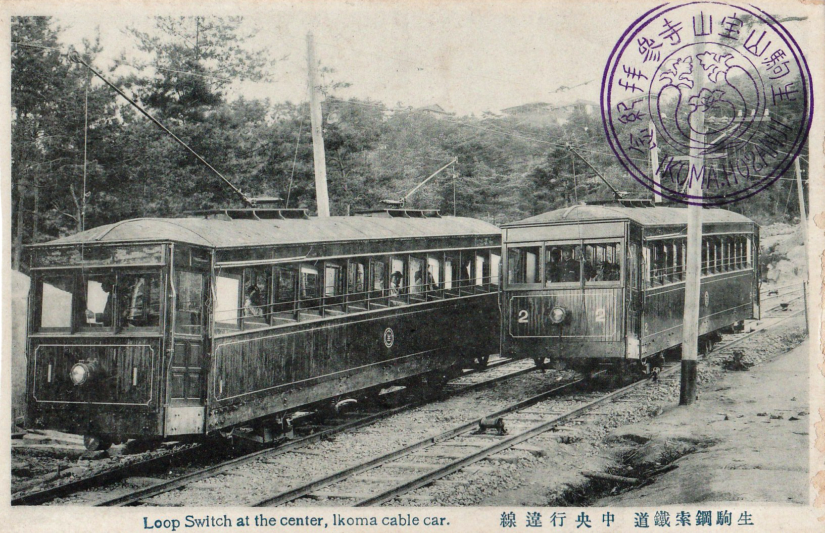 開業時と思われる生駒ケーブル線